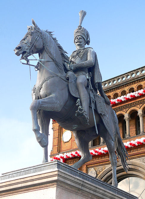 Ernst-August-Denkmal in Hannover. 1856 ging der Auftrag an den Berliner Bildhauer Christian Daniel Rauch, der Entwurf wurde ausgeführt von seinem Schüler Albert Wolff